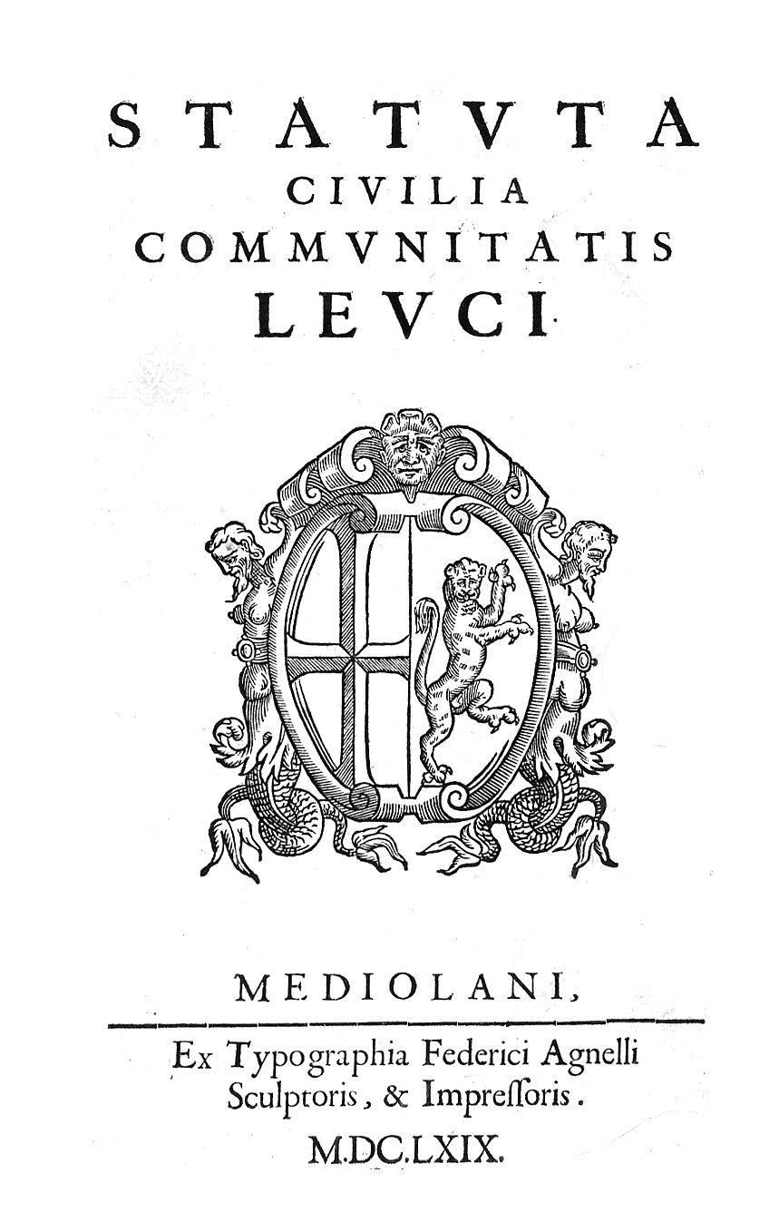 Statuta communitatis Leuci, 1669